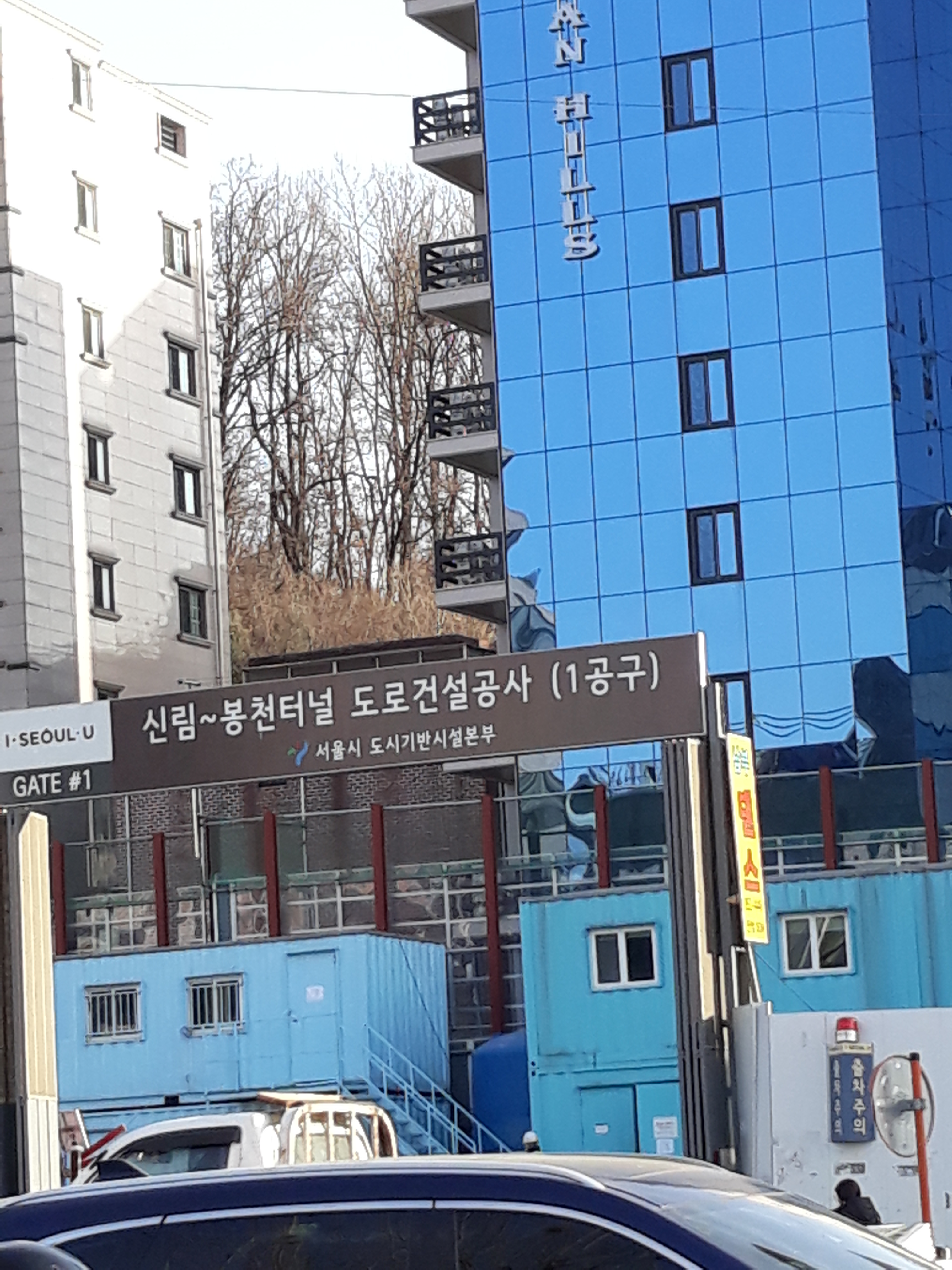 난곡사거리와 남부순환로 교차 할 예정이다 현재는 공사중이다